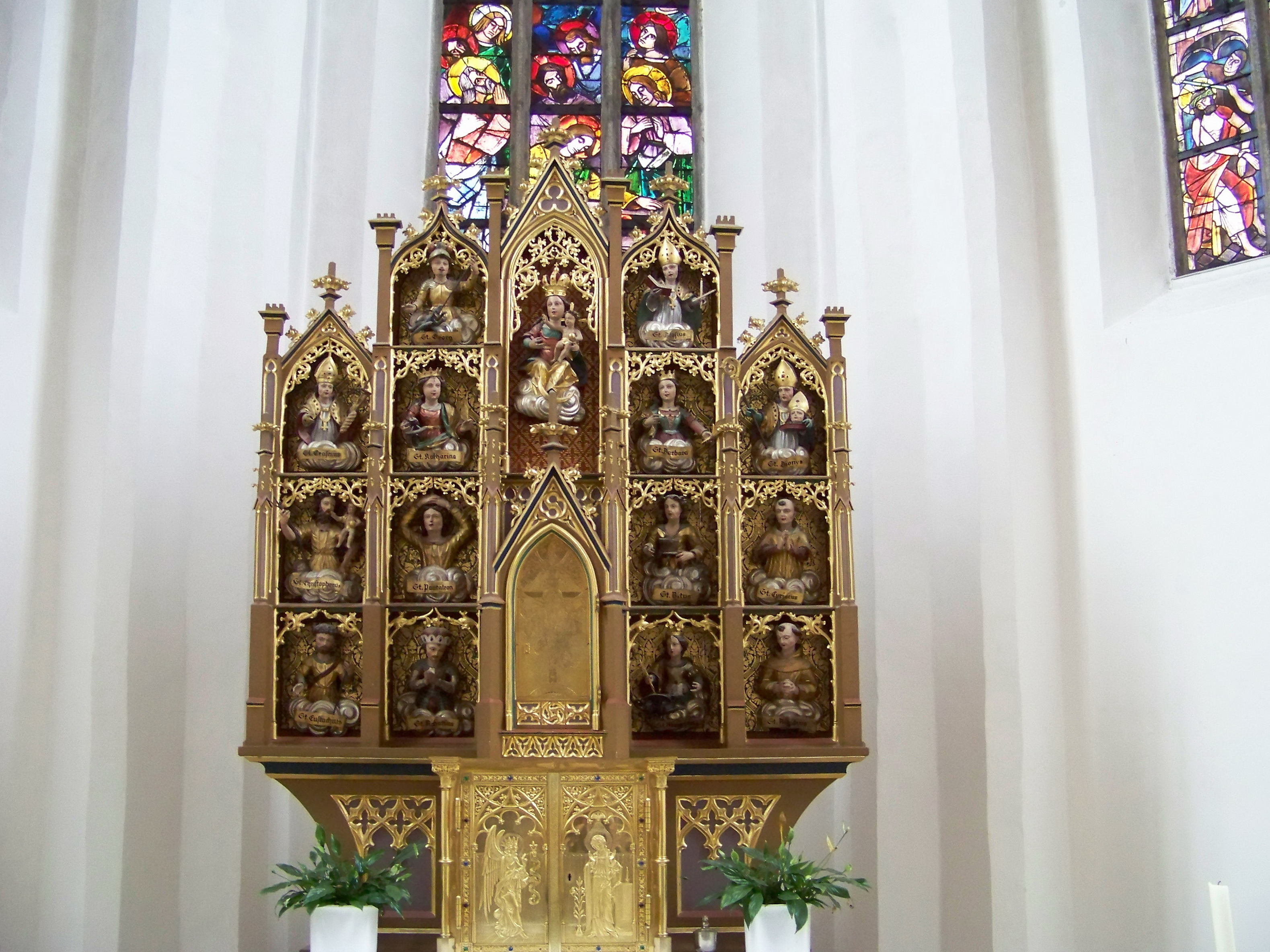 Neugotischer Hochaltar. Im den Schreinen stehen Holzfiguren der 14 Nothelfer aus der Barockzeit. Die kleinen Schnitzwerke sind als Halbfiguren auf Wolkengruppen dargestellt. Es handelt sich um: St. Georg, St. Erasmus, St. Katharina, St. Christophorus, St. Pantaleon, St. Eustachius, St. Achatius, St. Blasius, St. Barbara, St. Dinonysius, St. Vitus, St. Cyriatus, St. Margareta und St. Aegidius. Im mittleren Schrein über dem Tabernakel befindet sich die Figurengruppe Maria mit Jesuskind. Der Altar befand sich früher in der Nothelferkapelle.